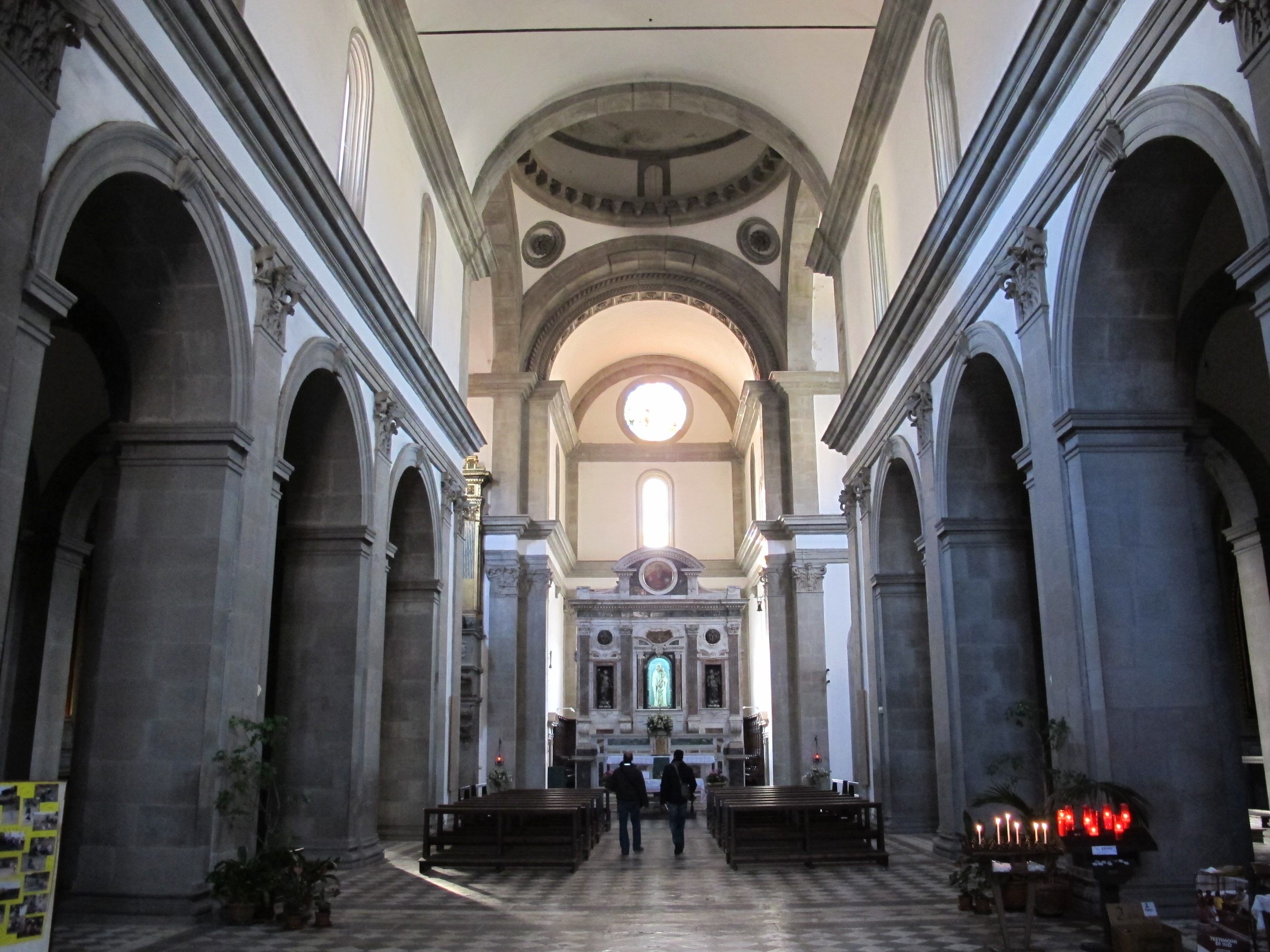 Santissima annunziata, arezzo, interno